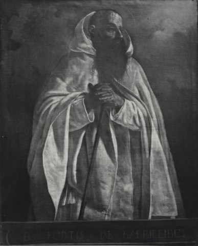 Bienheureux Forte Gabrielli, par Venanzio l'Eremita. Naples, Eremo del SS. Salvatore ai Camaldoli.